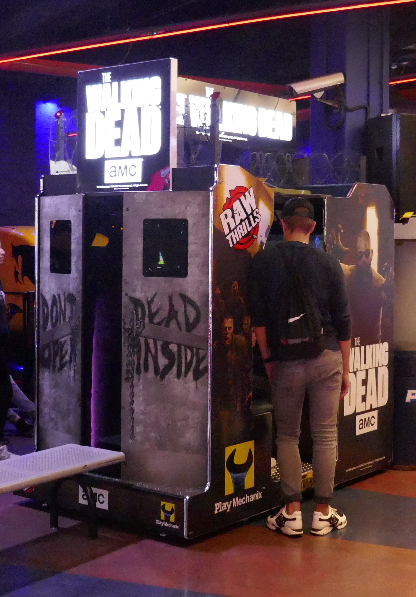 Borne d'arcade du jeu The Walking Dead